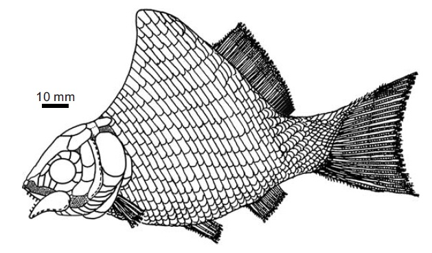 Reconstruction of the basal actinopterygian fish Luoxiongichthys hyperdorsalis gen. et sp. nov., Guanling Formation, Anisian, Middle Triassic; Daaozi Quarry, Luoping, Yunnan Province, Southwest China; in lateral view.